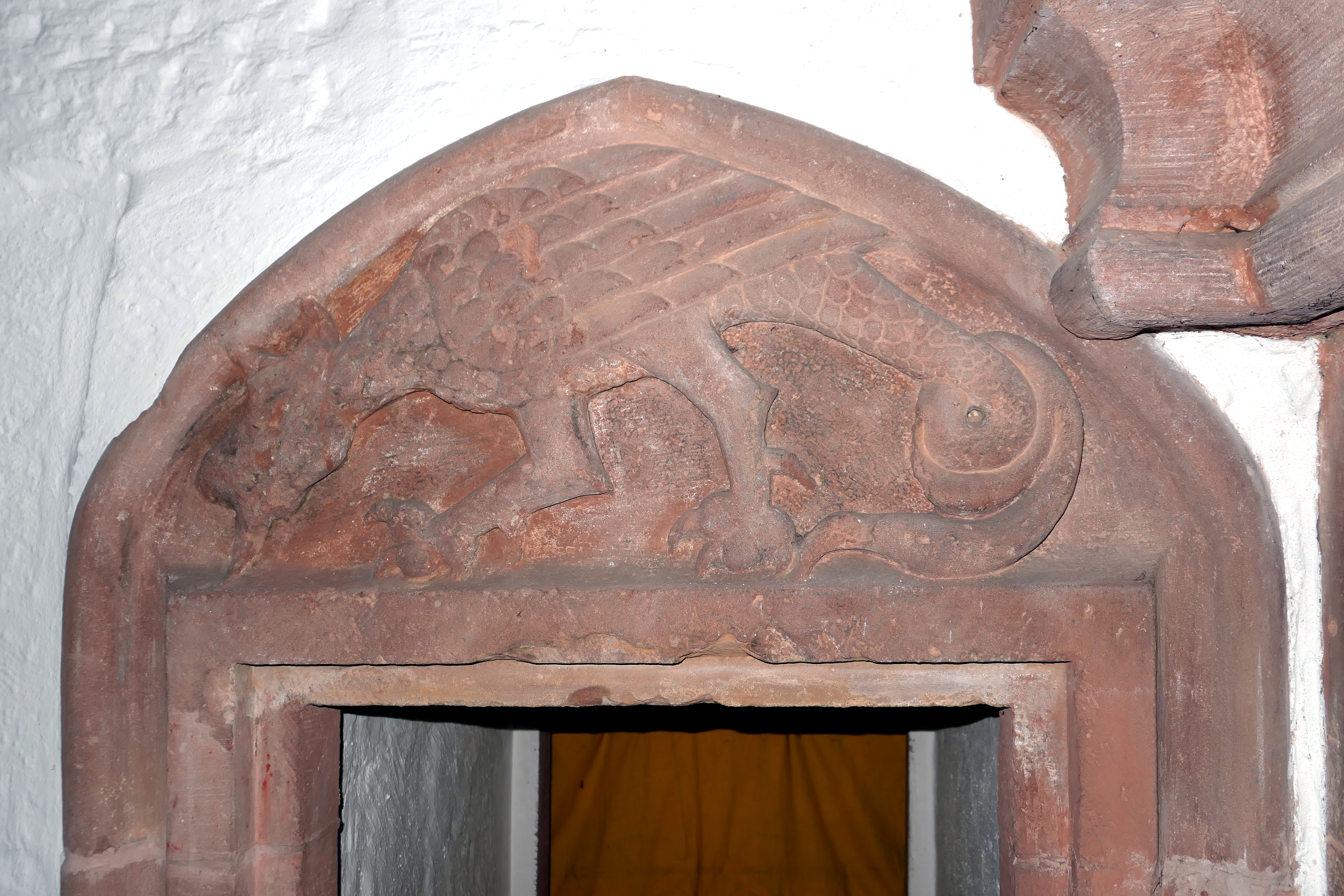 Kloster Eußerthal Tympanon Nordkapelle Basilisk